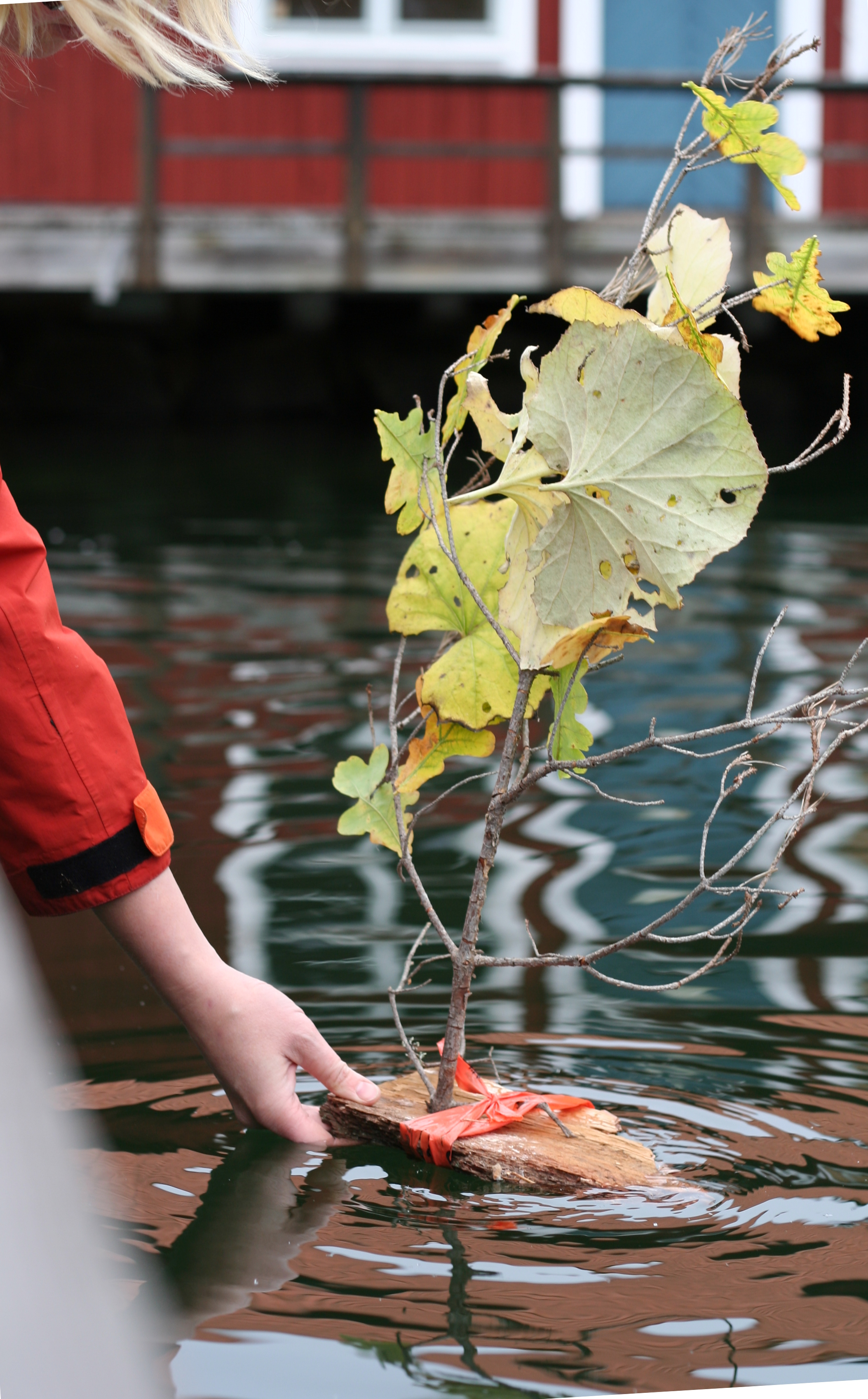 En barkbåt.